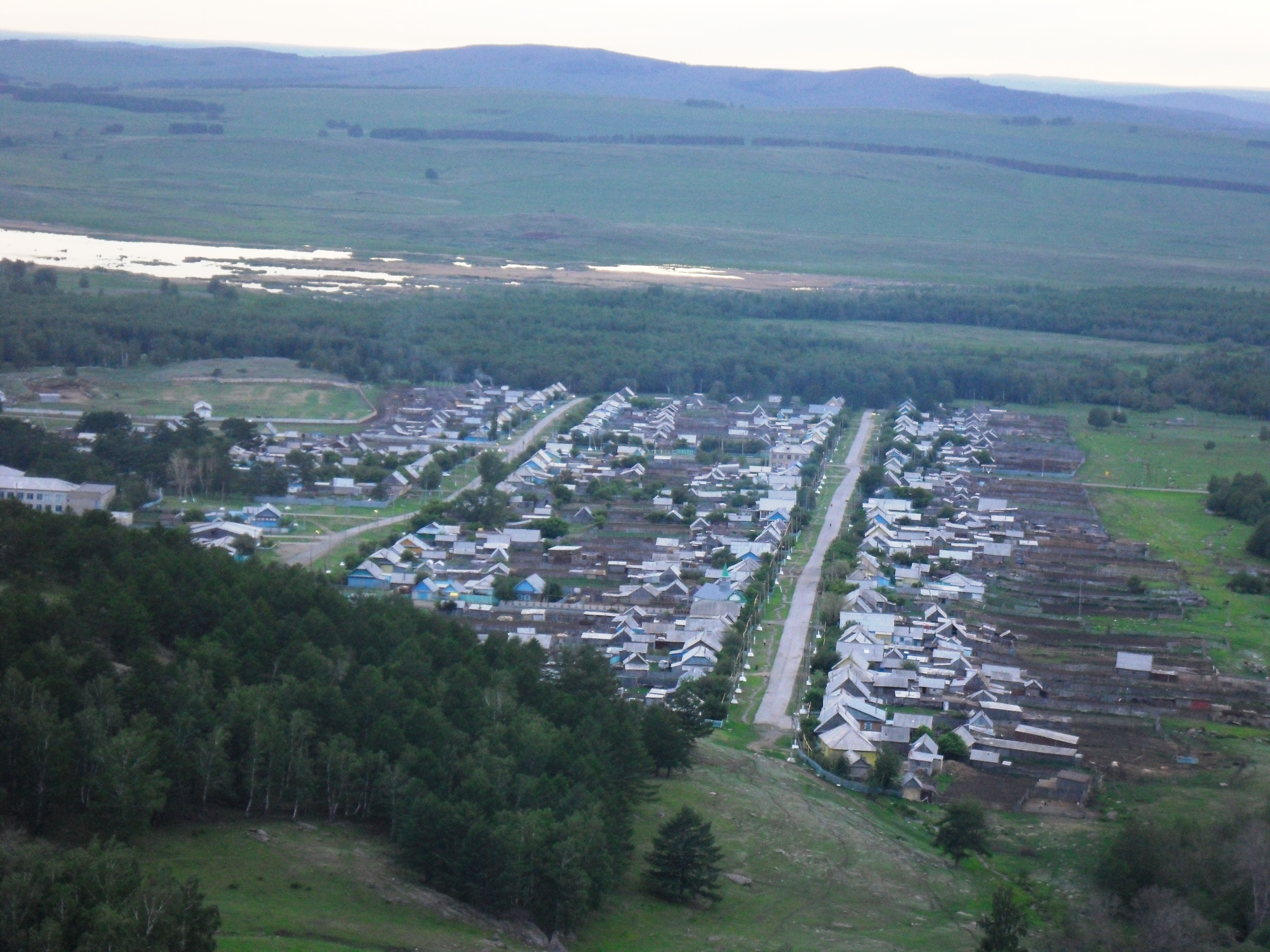 Вид на село Мерясово с горы Ирандык